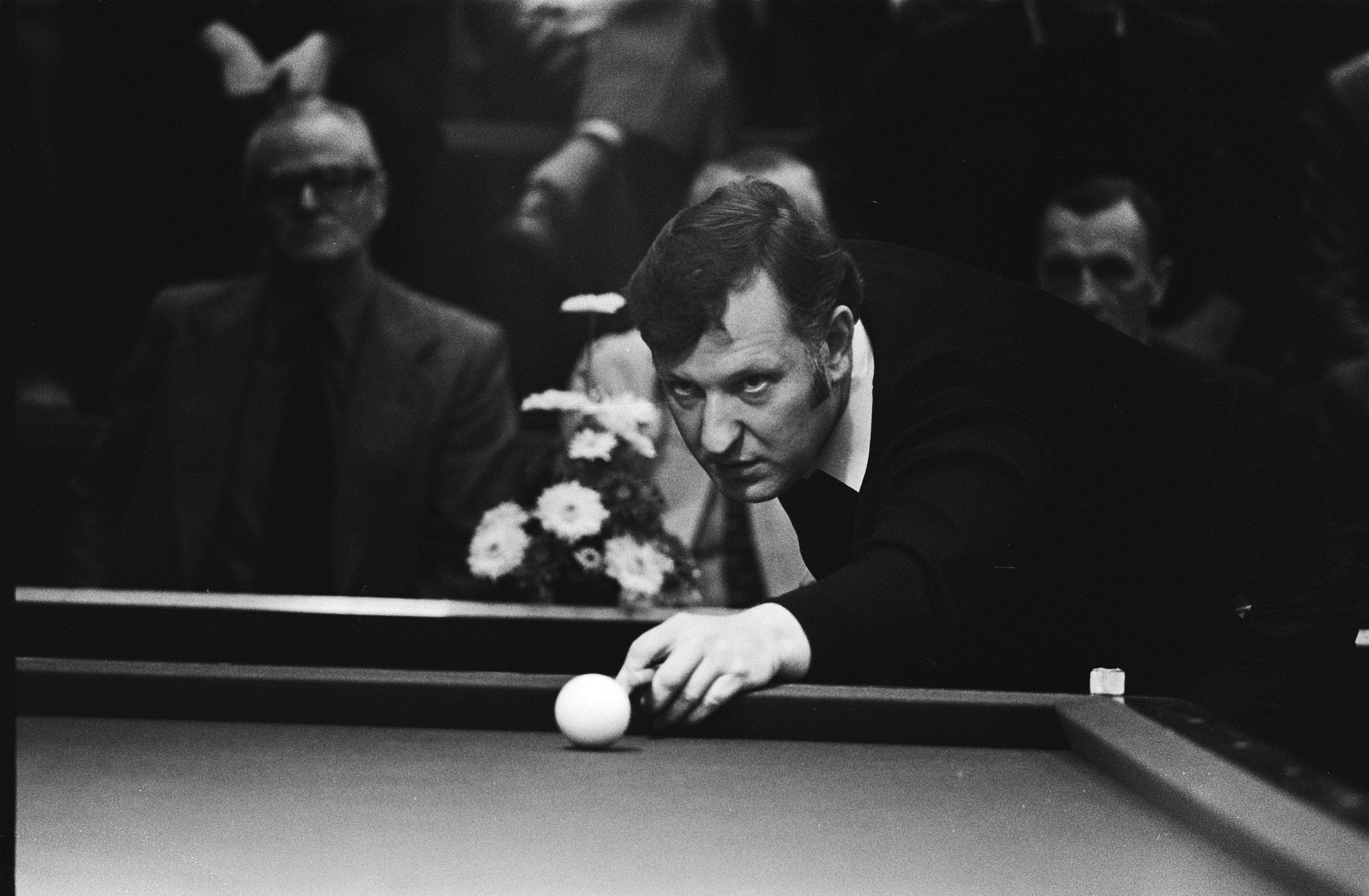 Collectie / Archief : Fotocollectie Anefo Reportage / Serie : [ onbekend ] Beschrijving : Europese kampioenschappen biljarten voor landenteam; Raymond Ceulemans in actie, nr. 30 Ludo Dielis in actie Datum : 4 november 1978 Trefwoorden : BILJARTEN, KAMPIOENSCHAPPEN Persoonsnaam : Ceulemans, Raymond Fotograaf : Bogaerts, Rob / Anefo Auteursrechthebbende : Nationaal Archief Materiaalsoort : Negatief (zwart/wit) Nummer archiefinventaris : bekijk toegang 2.24.01.05 Bestanddeelnummer : 929-9781